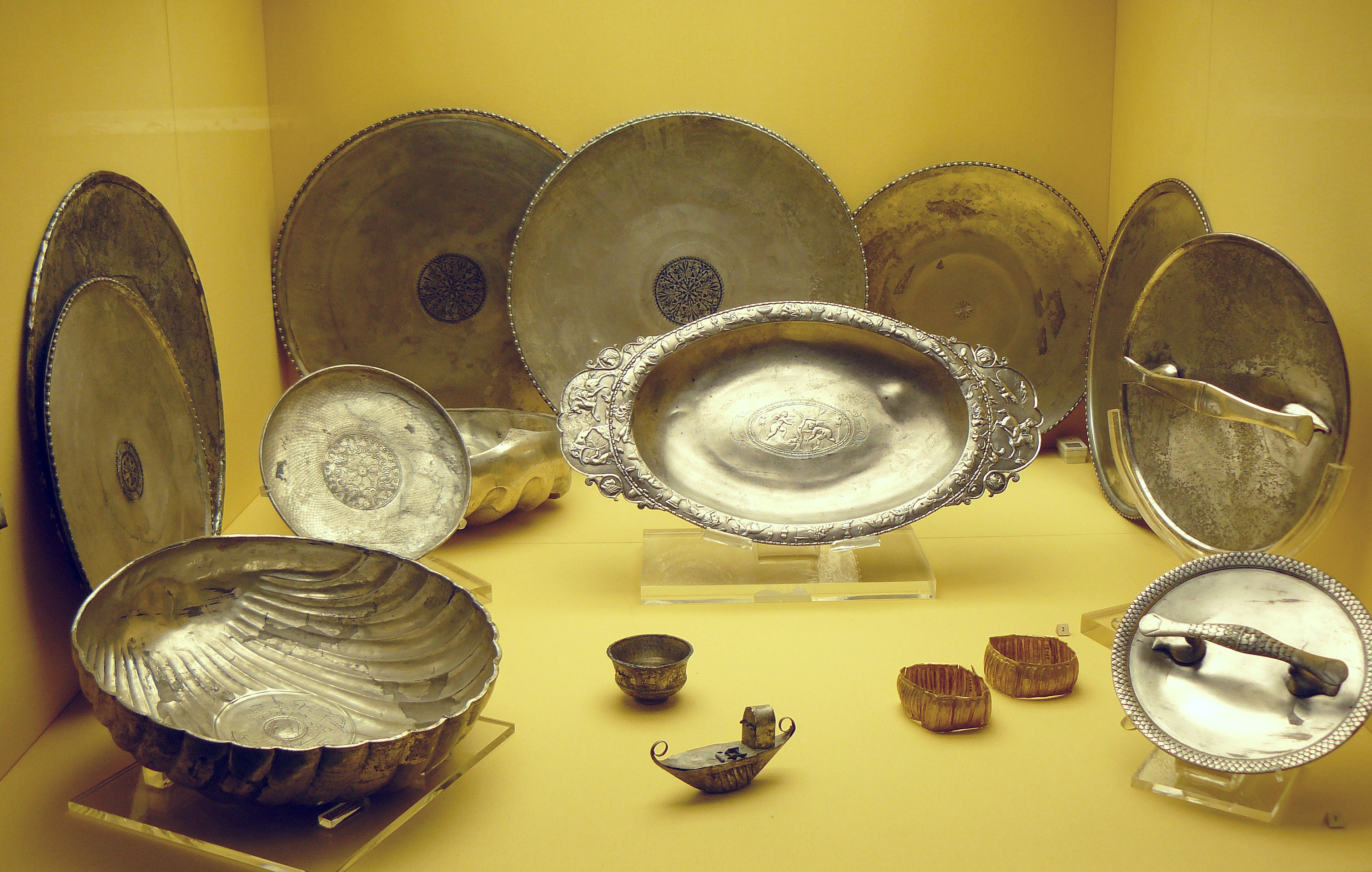 Présentation du « Trésor de Rethel » , 16 pièces d'argenterie gallo-romaine découvertes en 1980 à Rethel (Ardennes), et datées vers 270-280. Musée d'Antiquités Nationales de Saint-Germain-en-Laye (France).